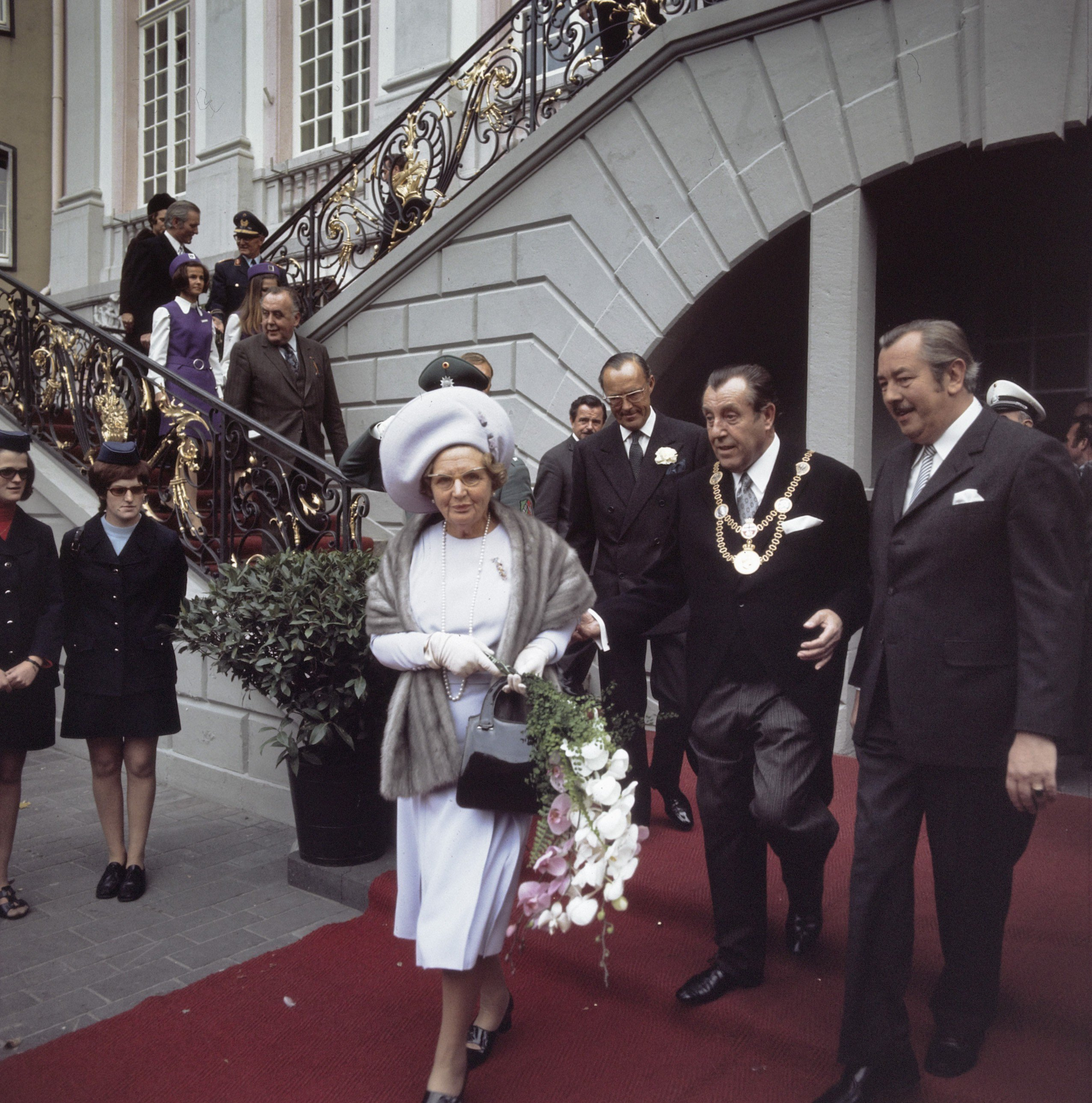 Collectie / Archief : Fotocollectie Anefo Reportage / Serie : Staatsbezoek Duitsland Beschrijving : Koningin Juliana en prins Bernhard verlaten het stadhuis van Bonn; rechts Oberbürgermeister Peter Kraemer Datum : 26 oktober 1971 Locatie : Duitsland, West-Duitsland Trefwoorden : burgemeesters, koninginnen, prinsen, staatsbezoeken Persoonsnaam : Bernhard (prins Nederland), Juliana (koningin Nederland) Fotograaf : Evers, Joost / Anefo Auteursrechthebbende : Nationaal Archief Materiaalsoort : Dia (kleur) Nummer archiefinventaris : bekijk toegang 2.24.01.07 Bestanddeelnummer : 254-9005